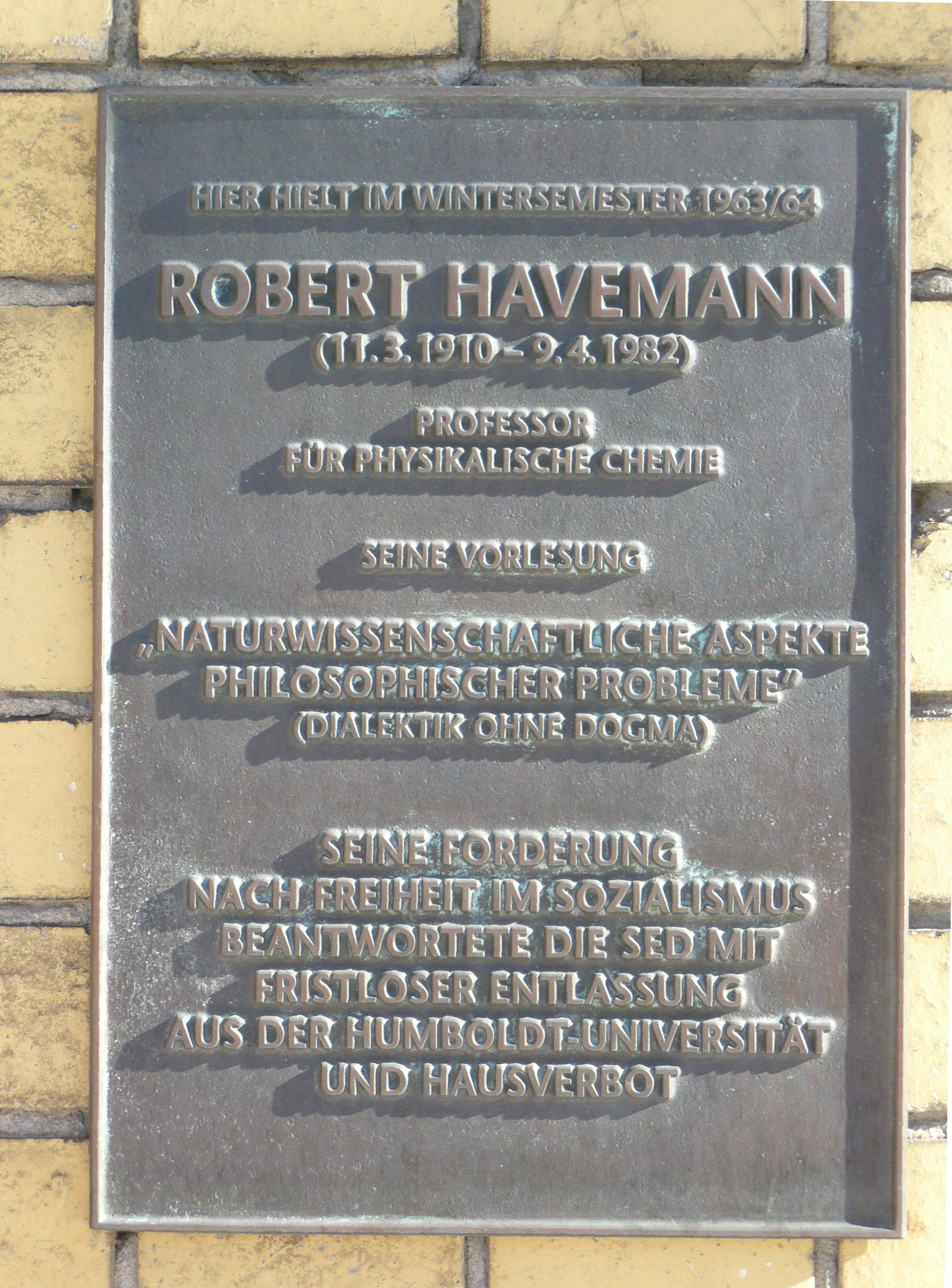 Chemisches Institut: Havemann-Gedenktafel in Berlin-Mitte